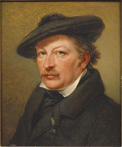 Portrait of Olov Johan Södermark (1790-1848)